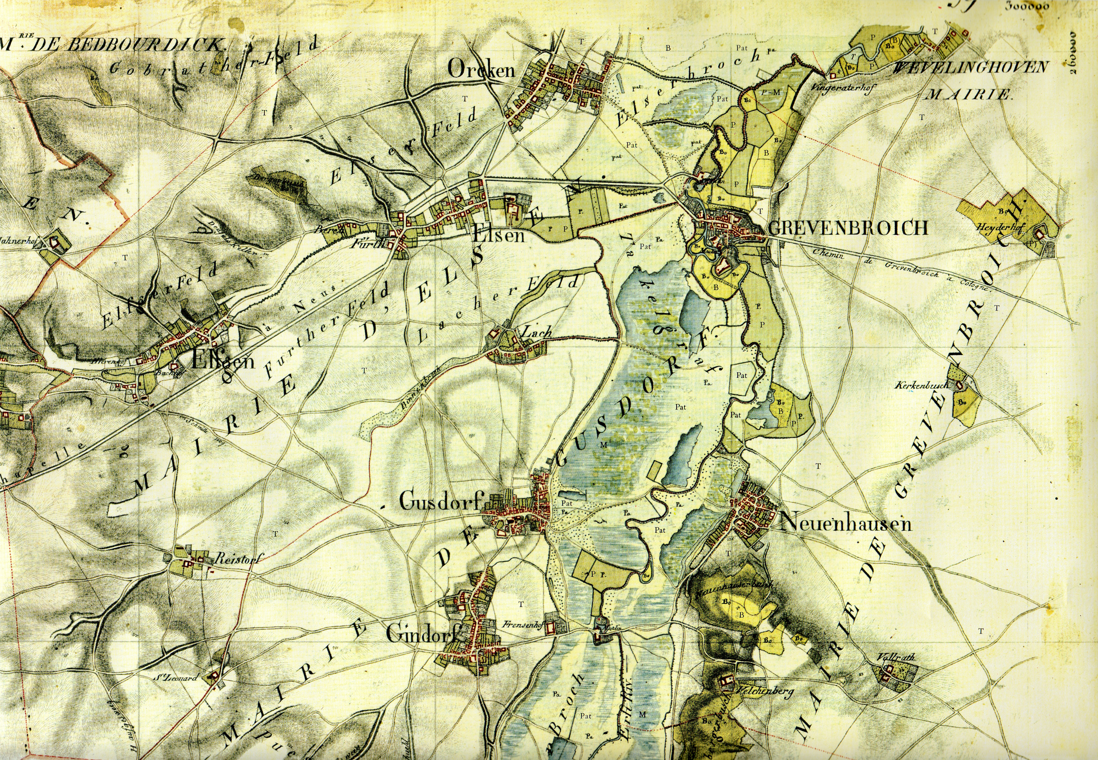 Kartenaufnahme der Rheinlande durch Tranchot und von Müffling